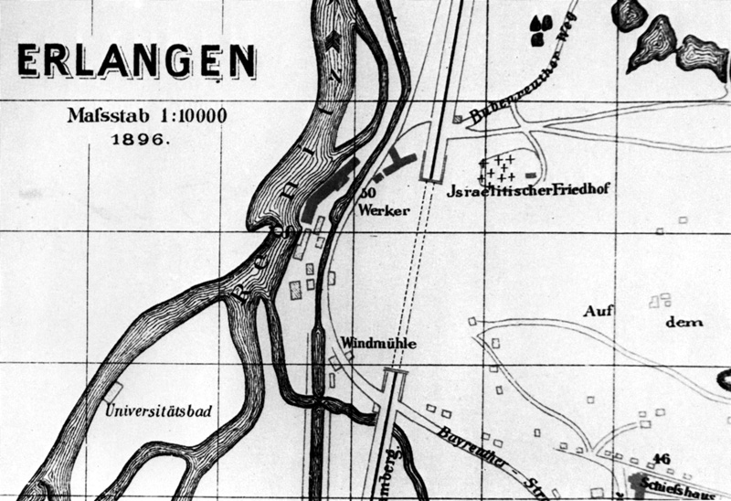 Ausschnitt eines Stadtplans von Erlangen. Zu sehen sind unter anderem, die Regnitz, der Ludwig-Donau-Main-Kanal, der Burgbergtunnel und der Israelitische Friedhof.